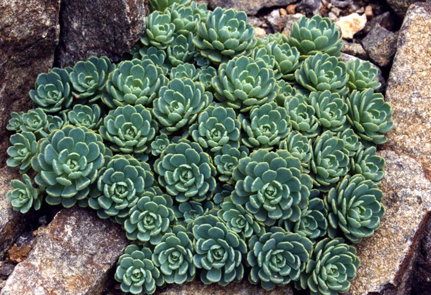 Sedum pachyclados